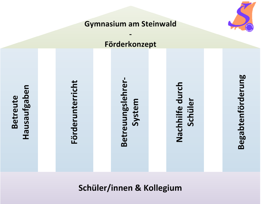 Das sogenannte "5-Säulen-Förderkonzept" des Gymnasium am Steinwald (GaS) in Neunkirchen/Saar.